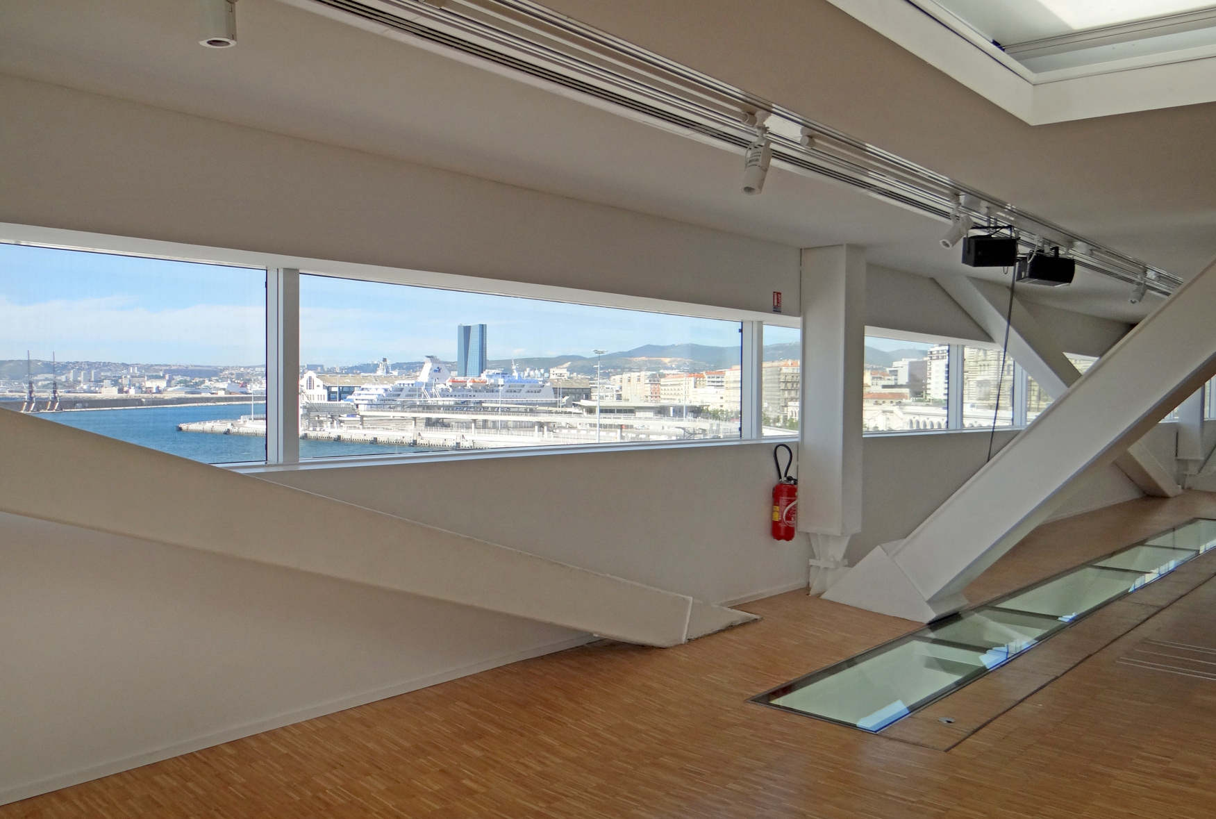 Le belvédère de la Villa Méditerranée avec vue sur le port de la Joliette Ce centre culturel consacré à la Méditerranée, comme on s'en doute, a été voulu par Michel Vauzelle, le Président de la Région Provence-Alpes-Côte d’Azur qui a financé seule le projet. L'architecte italien : Stefano Boeri a conçu un édifice hors normes qui développe ses espaces sur et sous la mer et se distingue par une spectaculaire avancée en porte-à-faux de 40 mètres, au-dessus d’un bassin artificiel de 2 000 m2. Véritable prouesse technique, il est, à ce jour, unique en Europe par sa capacité d’accueil du public. Le niveau supérieur, dont le toit culmine à 19 mètres au-dessus du bassin, accueille un plateau d’exposition de 760 m2, relié par une passerelle à une salle de 150 m2 et entouré d’un belvédère en libre-accès. Le problème actuel de cet édifice ce sont les infiltrations, en effet le bassin d'eau de mer situé au-dessus de l'amphithéâtre a du être vidé car il fuit à l'intérieur du sous-sol, des travaux d'étanchéité sont en cours ! Il faut donc prendre au mot l'architecte quand il écrit :-)) : La première intention était de faire pénétrer un morceau de mer à l’intérieur du bâtiment... C’est l’élément principal d’union qui oriente, anime et organise le projet tout entier. dixit Stefano Boeri Source : Site officiel